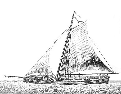 Grabado de una lancha cañonera española de finales del siglo XVIII.